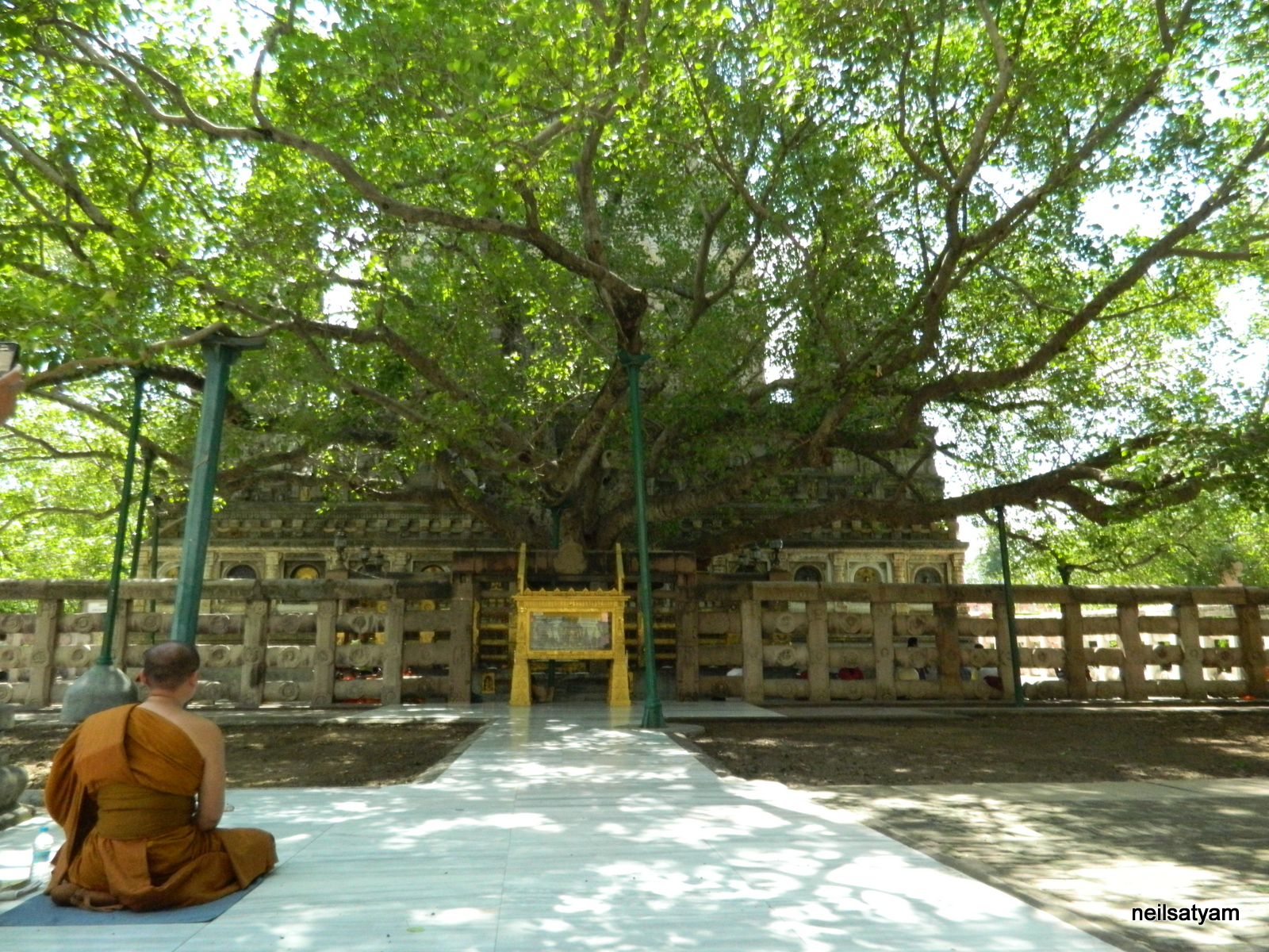 Bodhi Tree Distant View